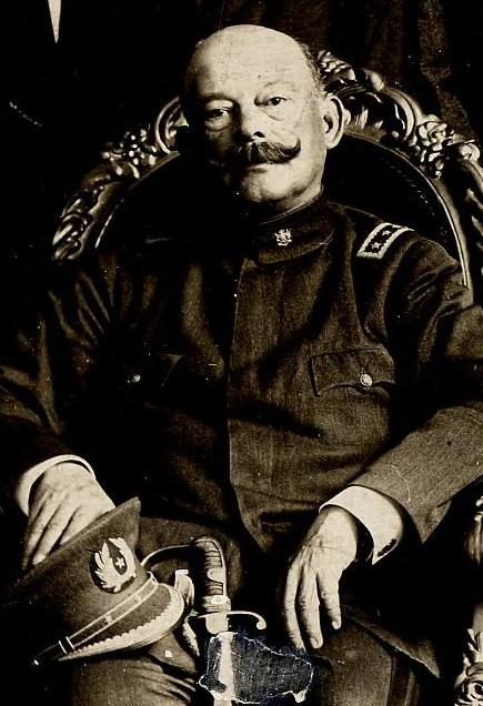 General Pedro Pablo Dartnell